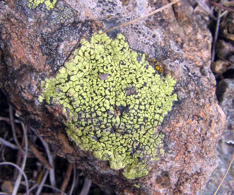 Lisaj sa Zlatibora